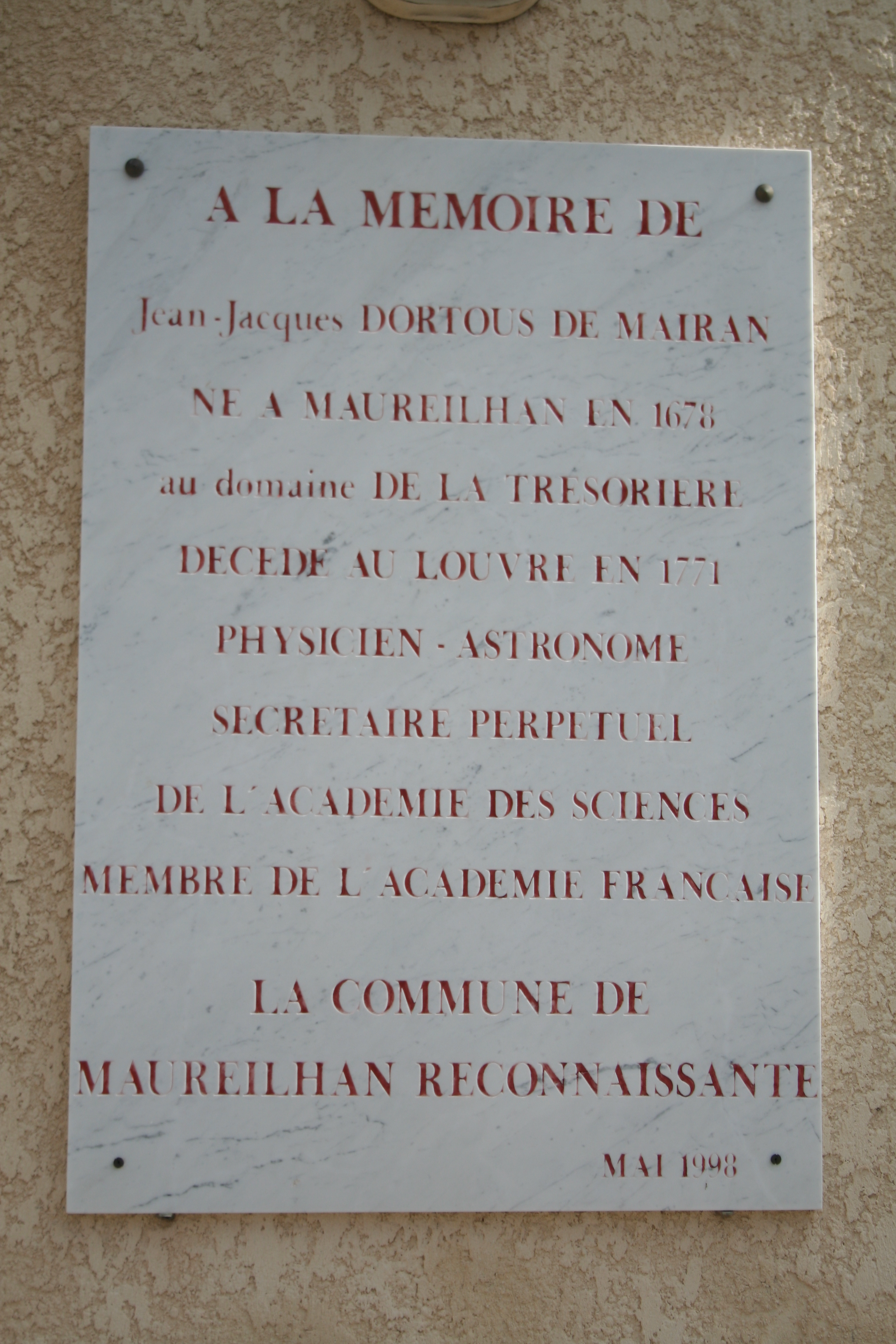 Maureilhan (Hérault) - plaque Jean Jacques Dortous de Mairan (1678-1771), physicien, astronome, secrétaire perpétuel de l'Académie des Sciences, membre de l'Académie frnaçaise